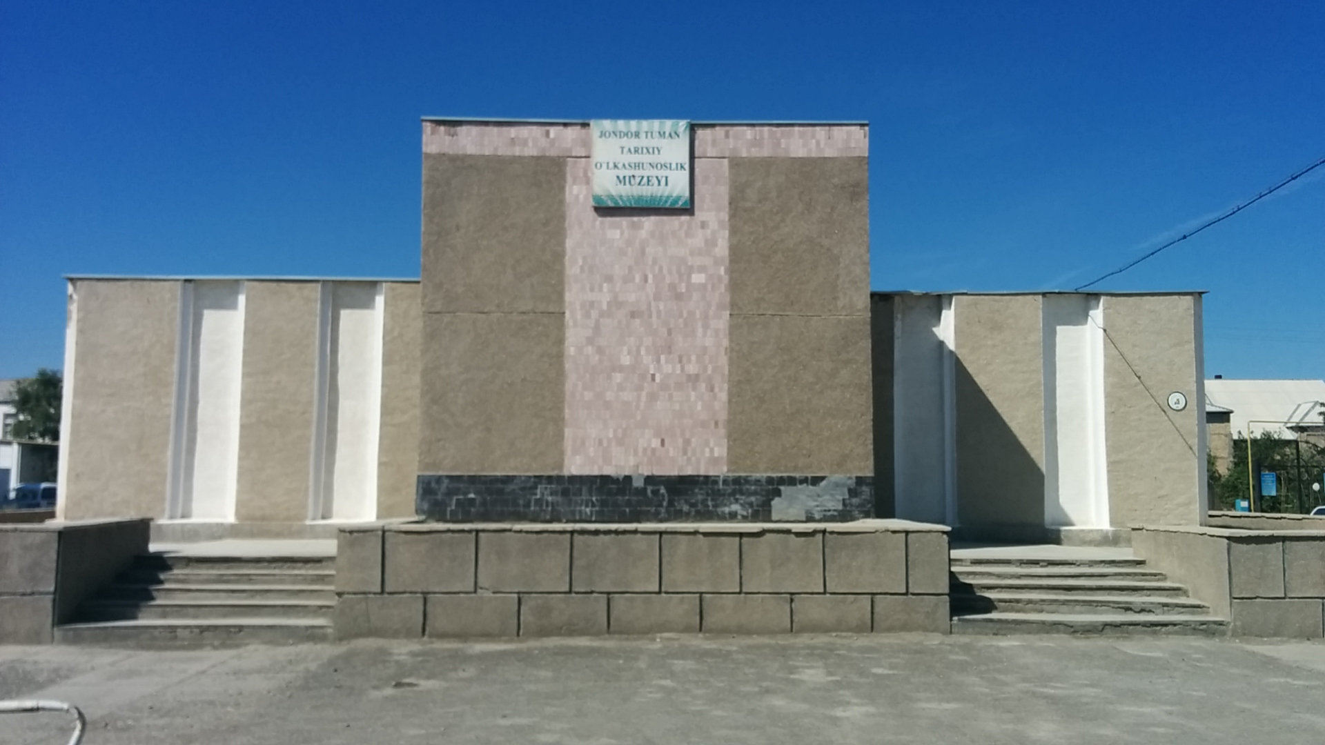 2015 yil